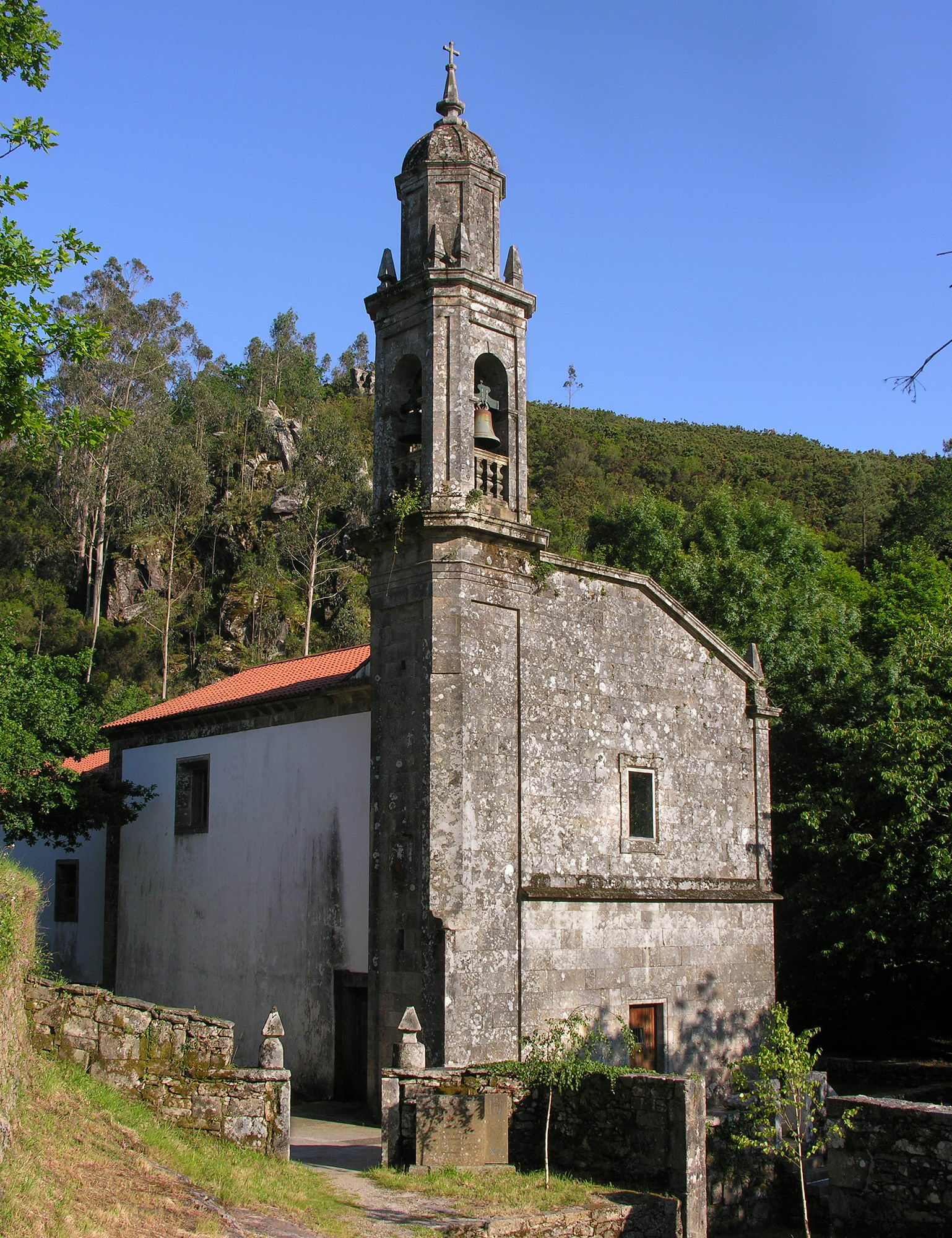 Igrexa da parroquia de San Xusto. Concello de Lousame. Galicia